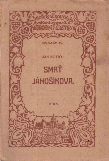 Vydání poemy Smrť Jánošíka z roku 1929